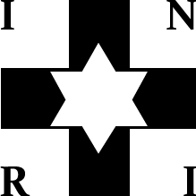 A Bulletin of Polaires kiadvány alapján készült